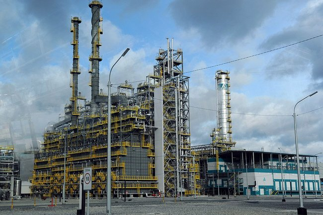 Комплекс нефтехимической промышленности «Тобольск-Полимер».